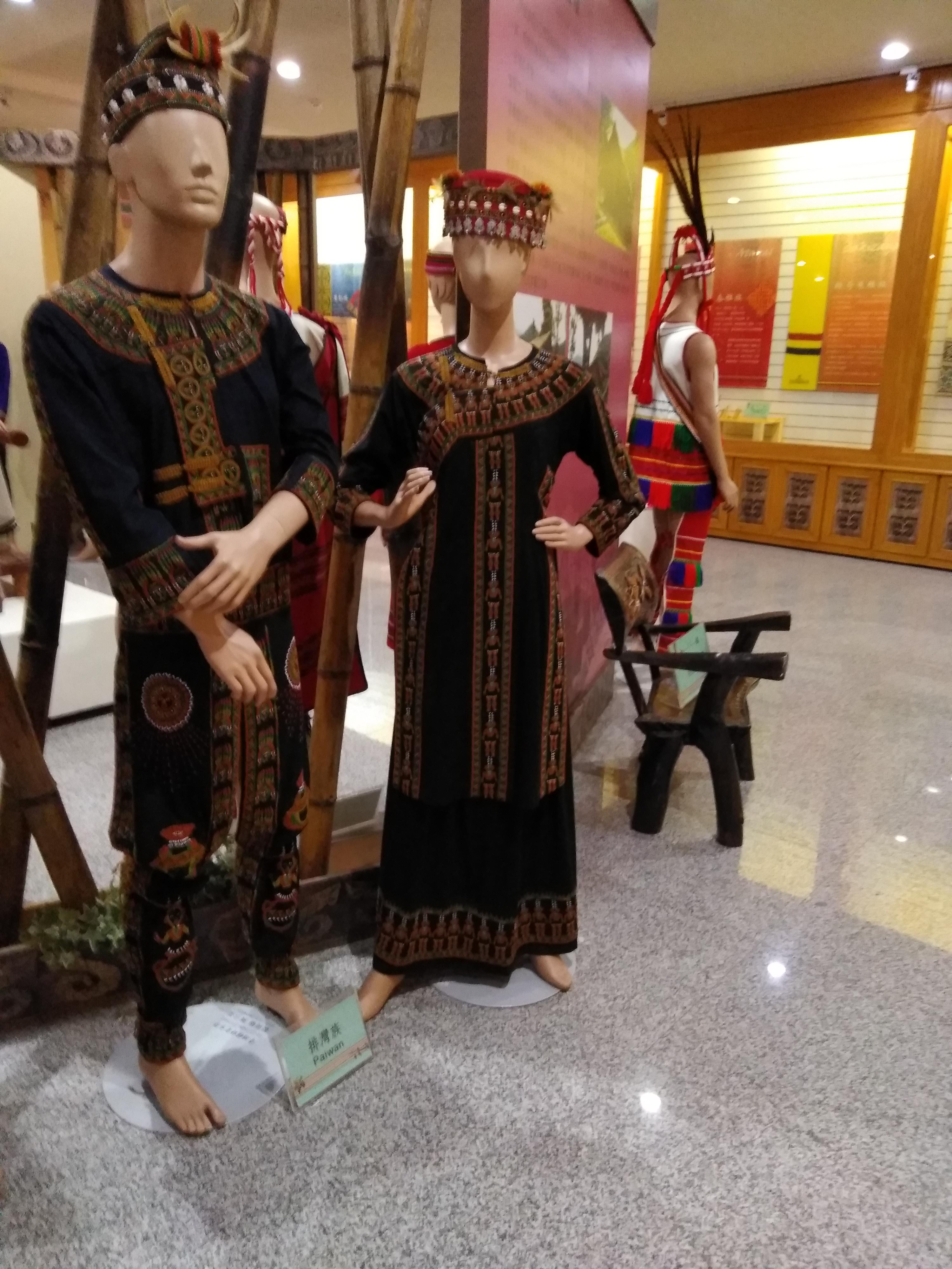 中文（台灣）: 台灣原住民服飾，排灣族